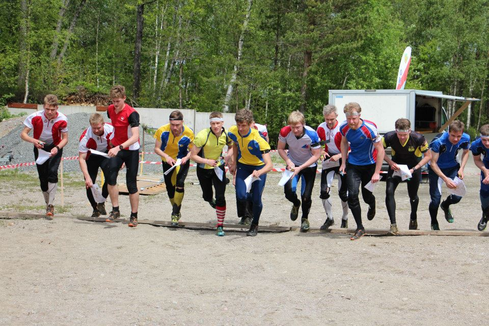 Masstartssprint i mångkampen orienteringsskytte